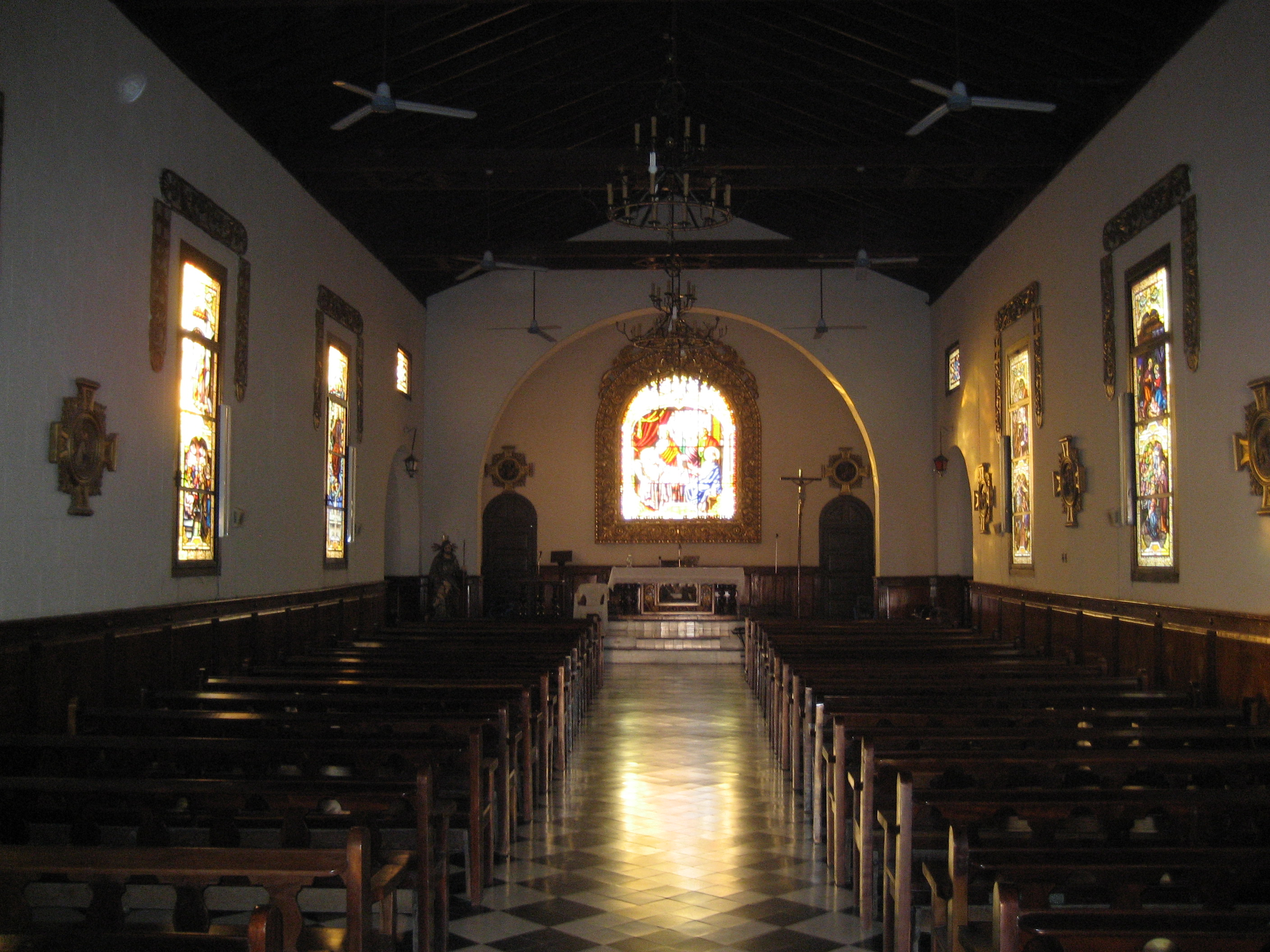 Cuba, Parroquia de San José de Jatibonico, interior del templo a la hora de la puesta del sol.